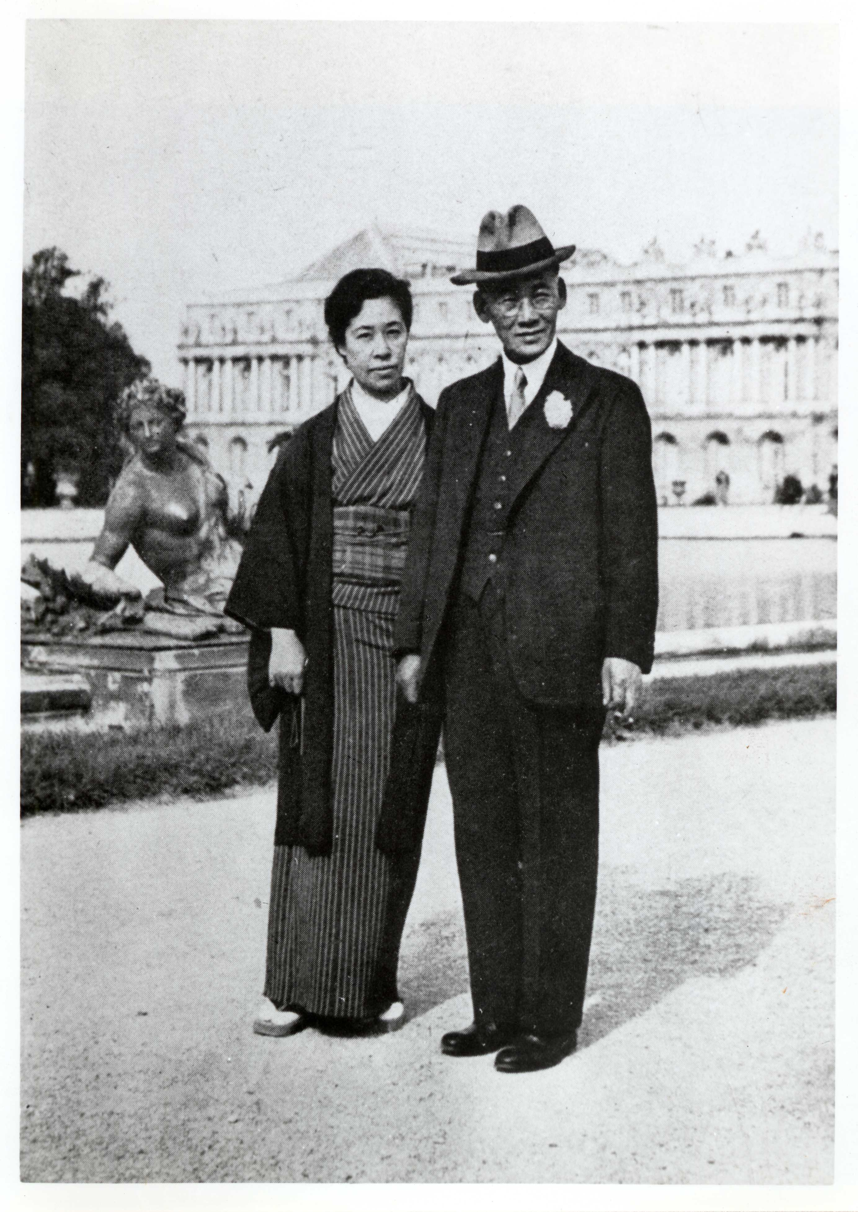 a Japanese painter, 岡田三郎助 (Okada Saburosuke)八千代（Okada Yachiyo)